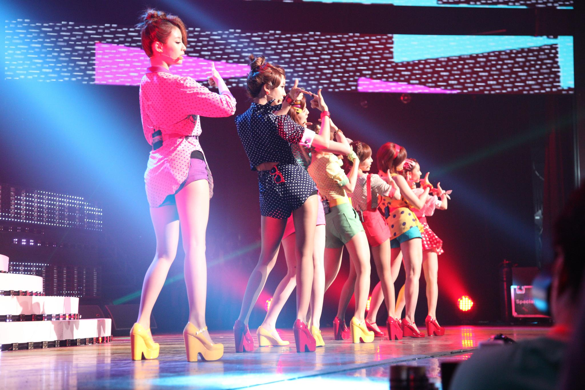 티아라 @ Cyworld Dream Music Festival 싸이월드 드림 뮤직 페스티벌_08